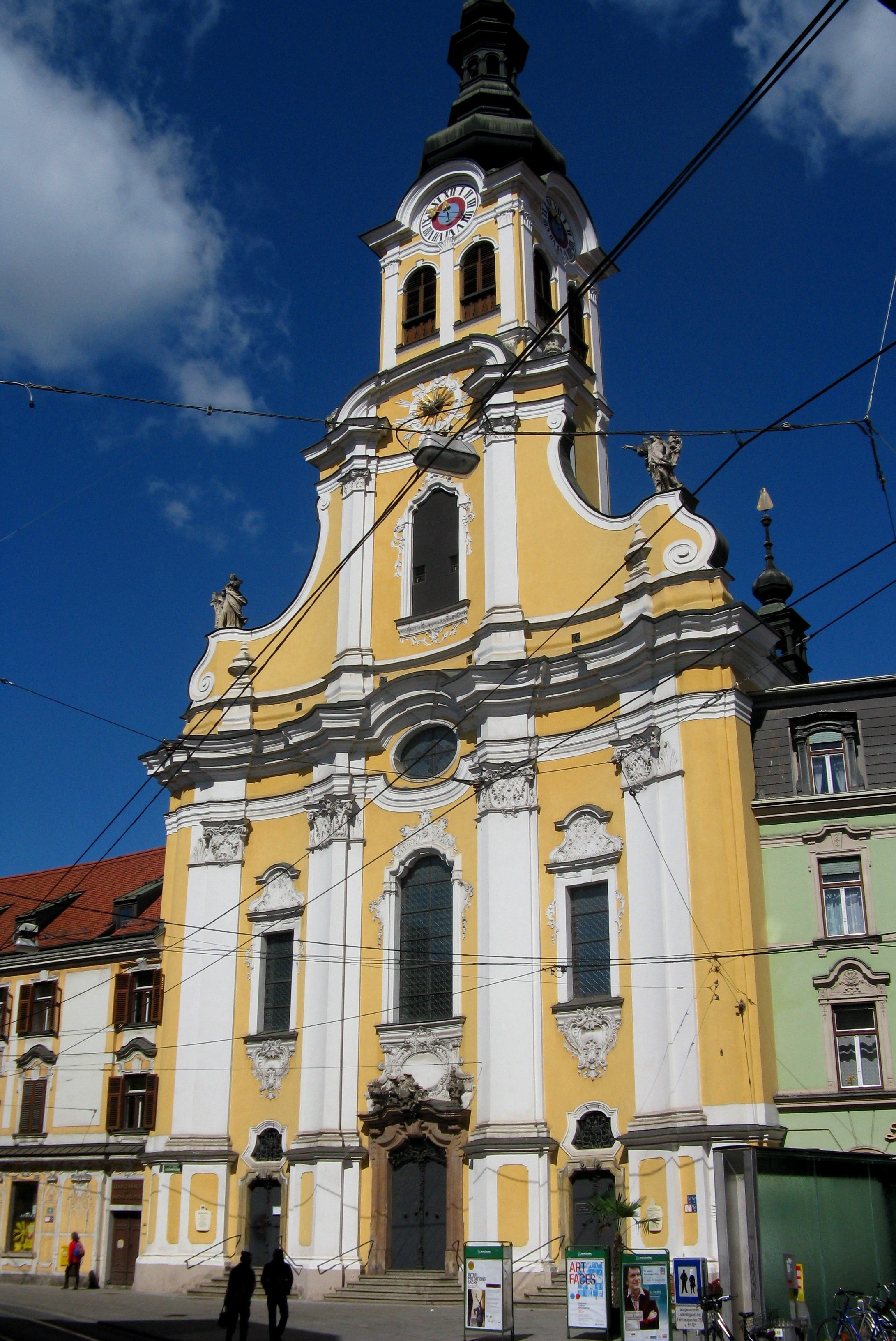 Barmherzigenkirche, Garnisonskirche Mariae Verkündigung